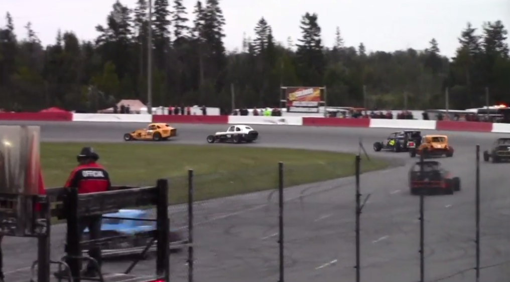 Capital City Speedway